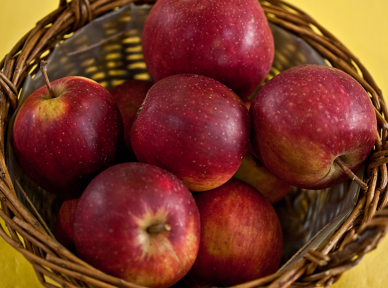 Der Purpurrote Cousinot ist eine Apfelsorte